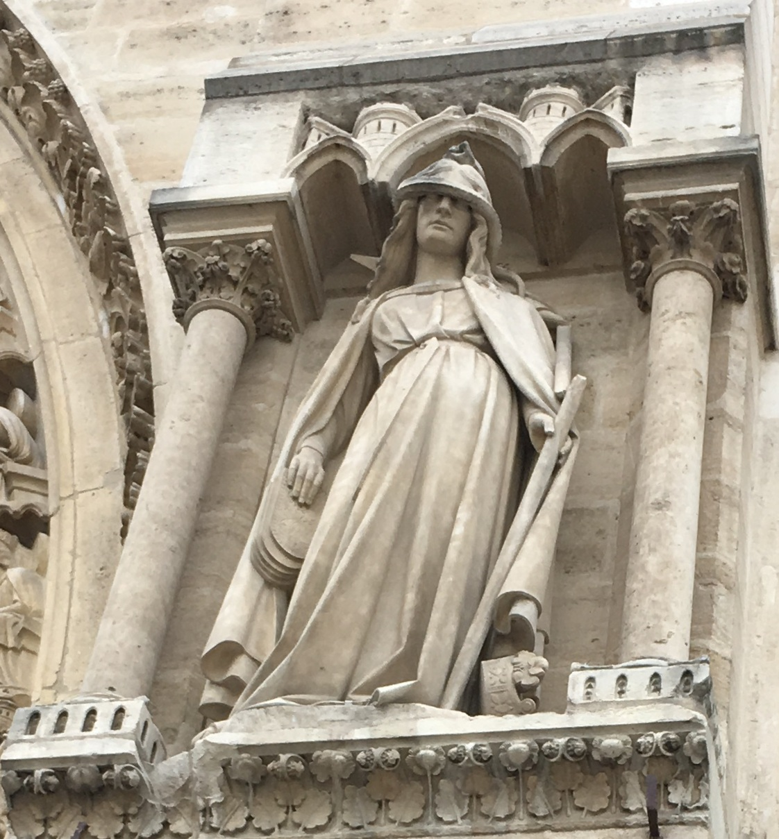 Statue de la Synagogue sur la façade occidentale de Notre-Dame de paris